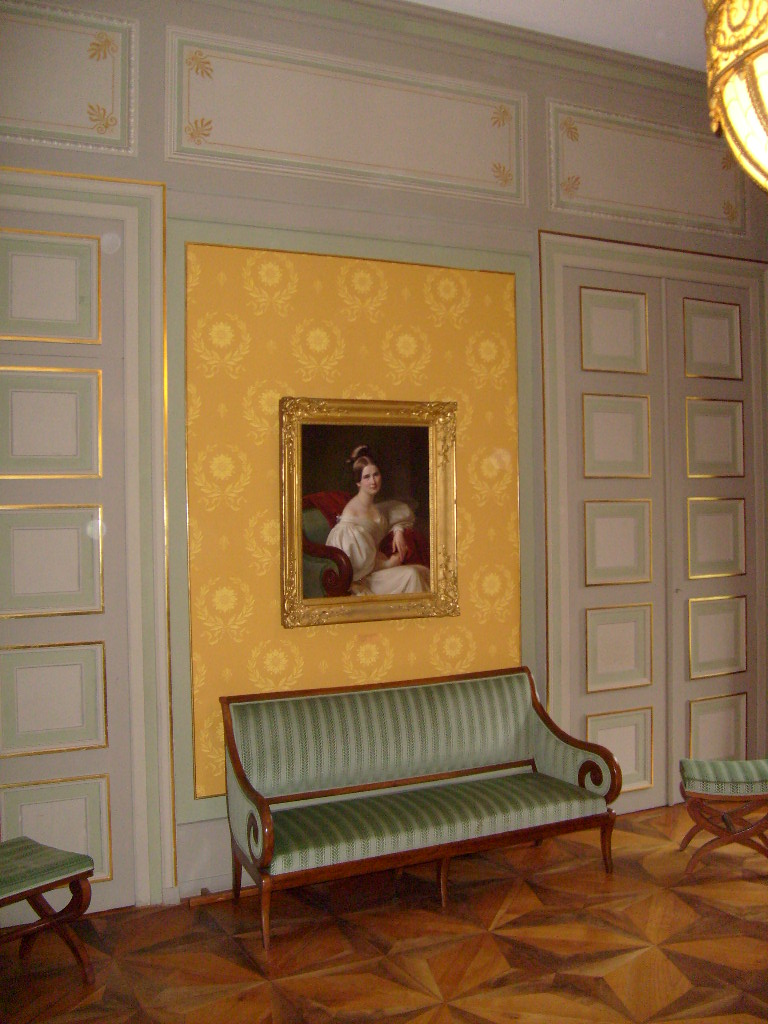 Premier salon de réception du Palais Eynard à Genève (Suisse)